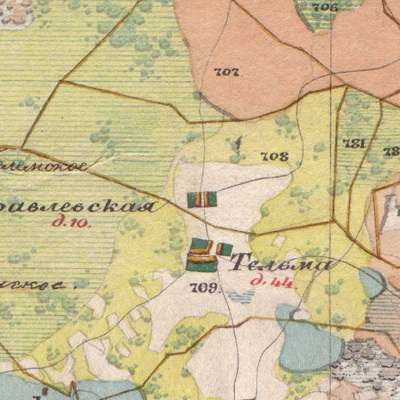 Деревня Муравлёвская на карте 1850 года